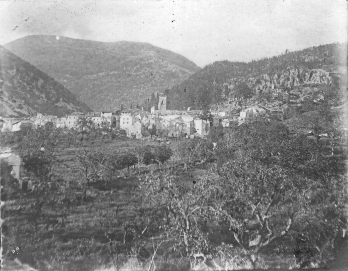 Naselje Solkan po vojni, v ozadju Sv. Gora